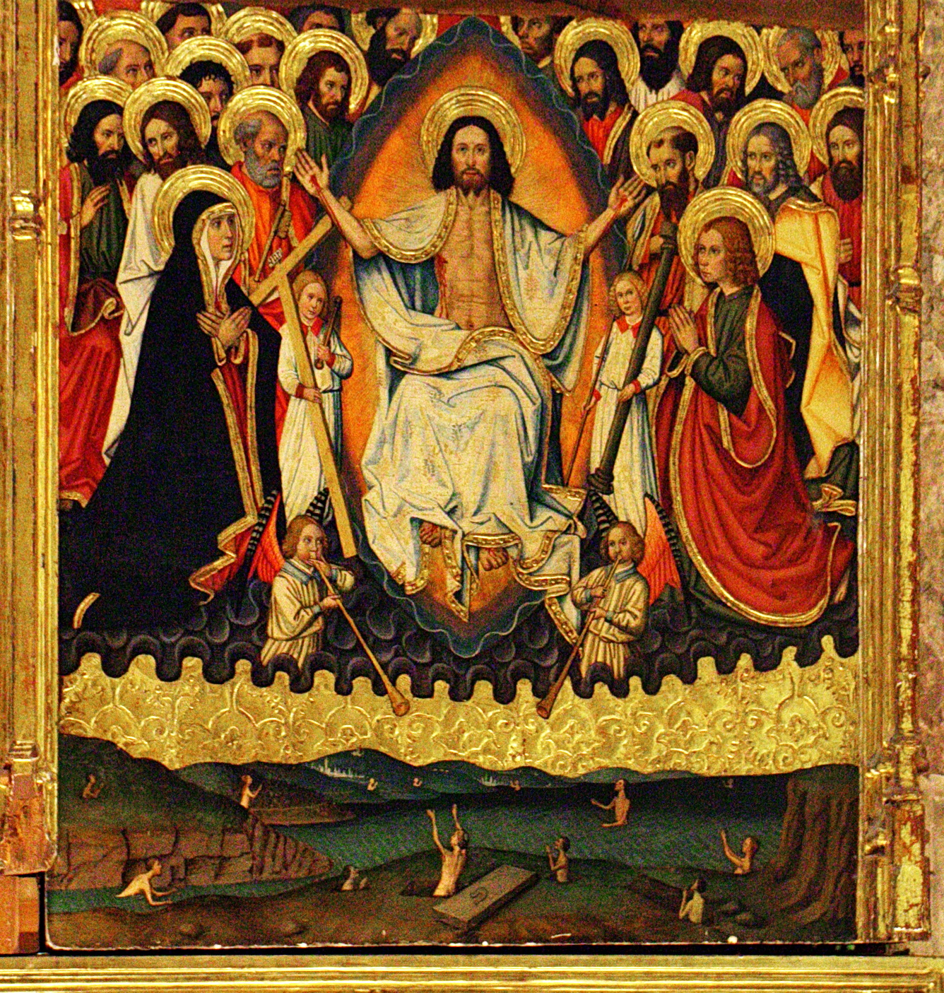 Taula del Judici Final del “Retaule de la transfiguració” de Jaume Huguet a la sala de l´antic refectori dels canonges, de la catedral de Tortosa. La seva ubicació original era a la capella central de la girola, darrera l'altar major.